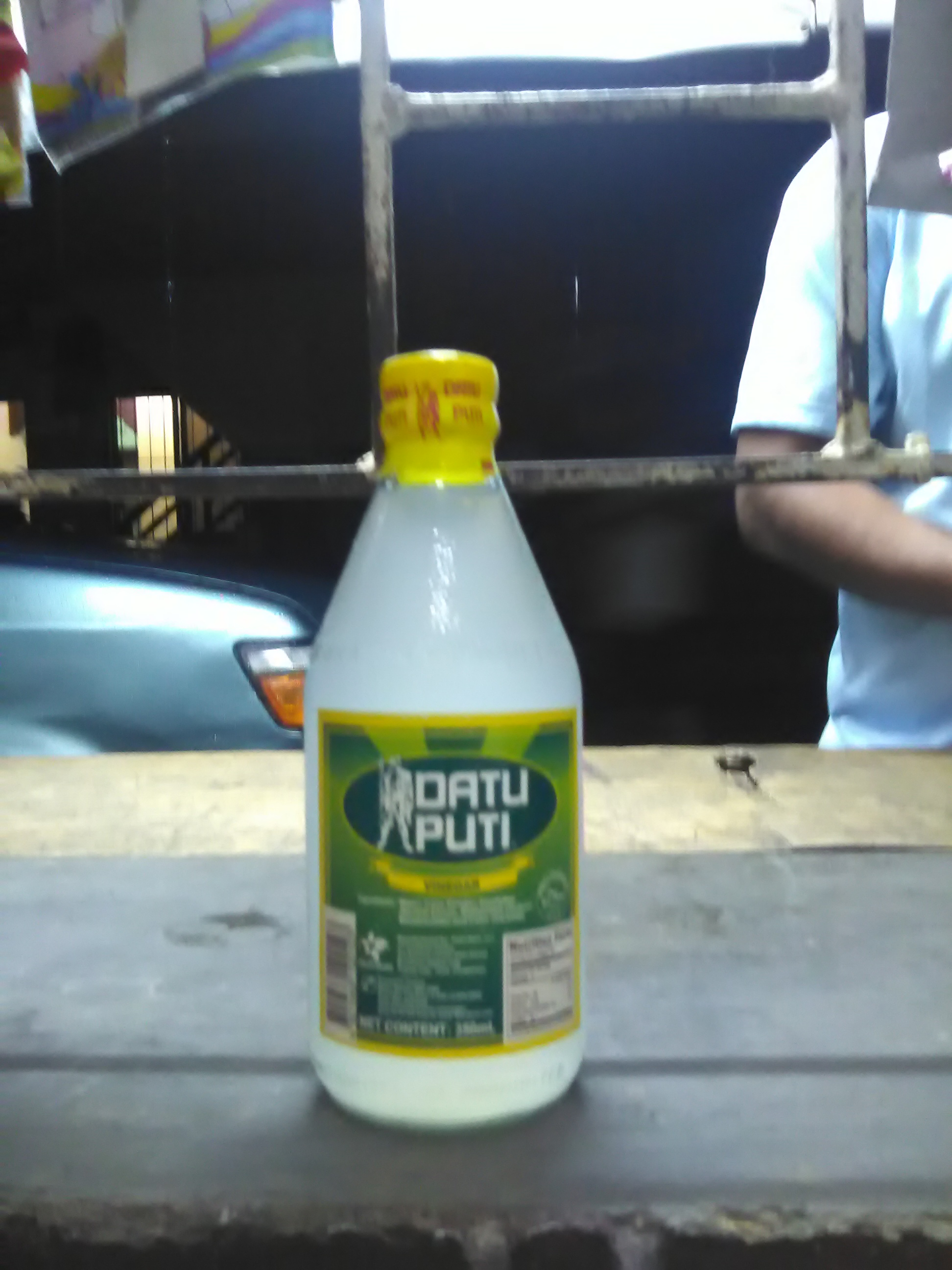 Tagalog: Ang Datu Puti sa Southside, Makati, Kalakhang Maynila